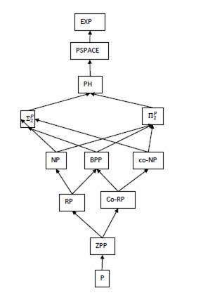 العلاقة بين الاقسام